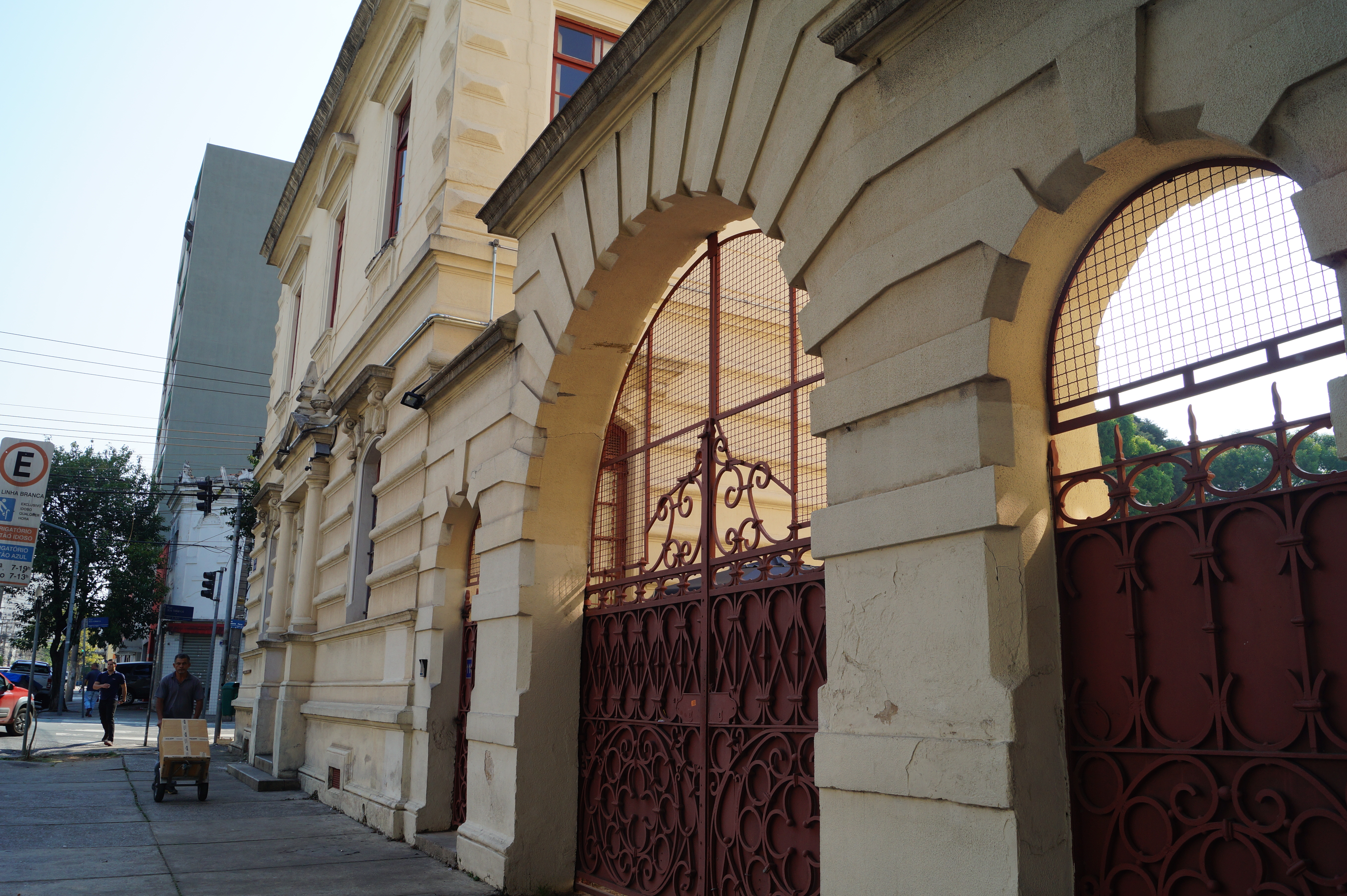 Fachada lateral do antigo Desinfectório Central (Bom Retiro - São Paulo - SP).